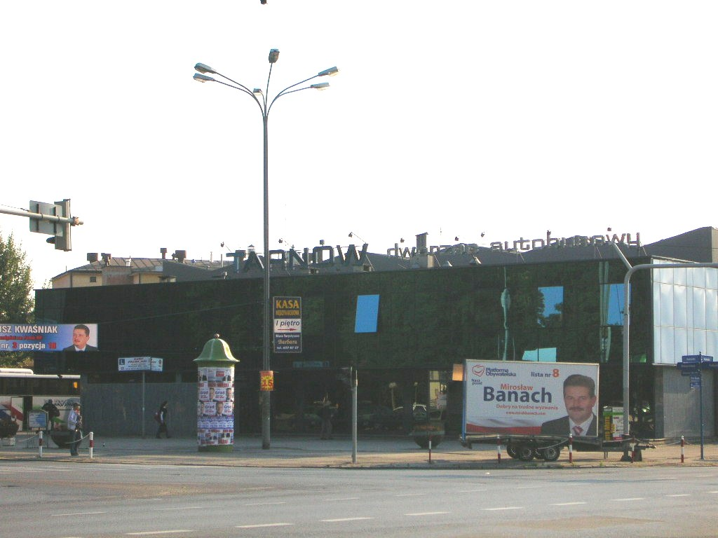 Tarnów-dworzec PKS